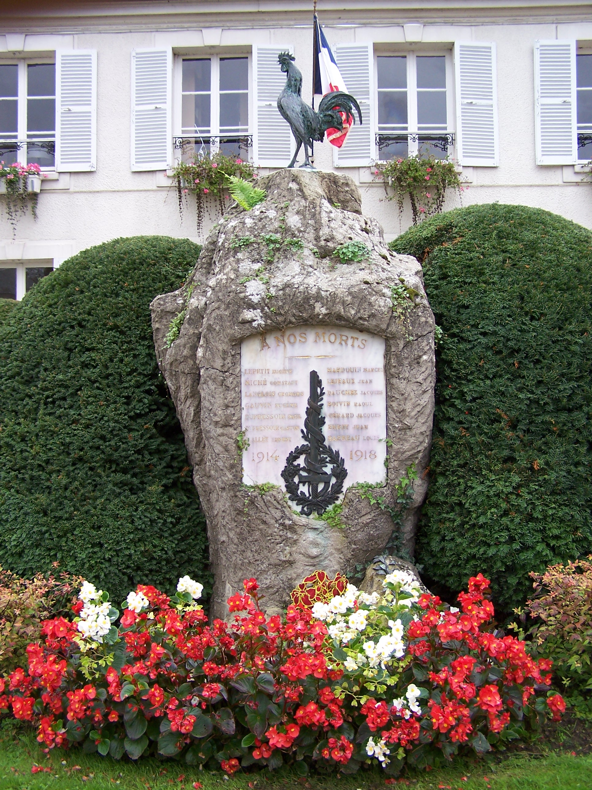 monument aux morts de Clairefontaine-en-Yvelines (Yvelines, France).